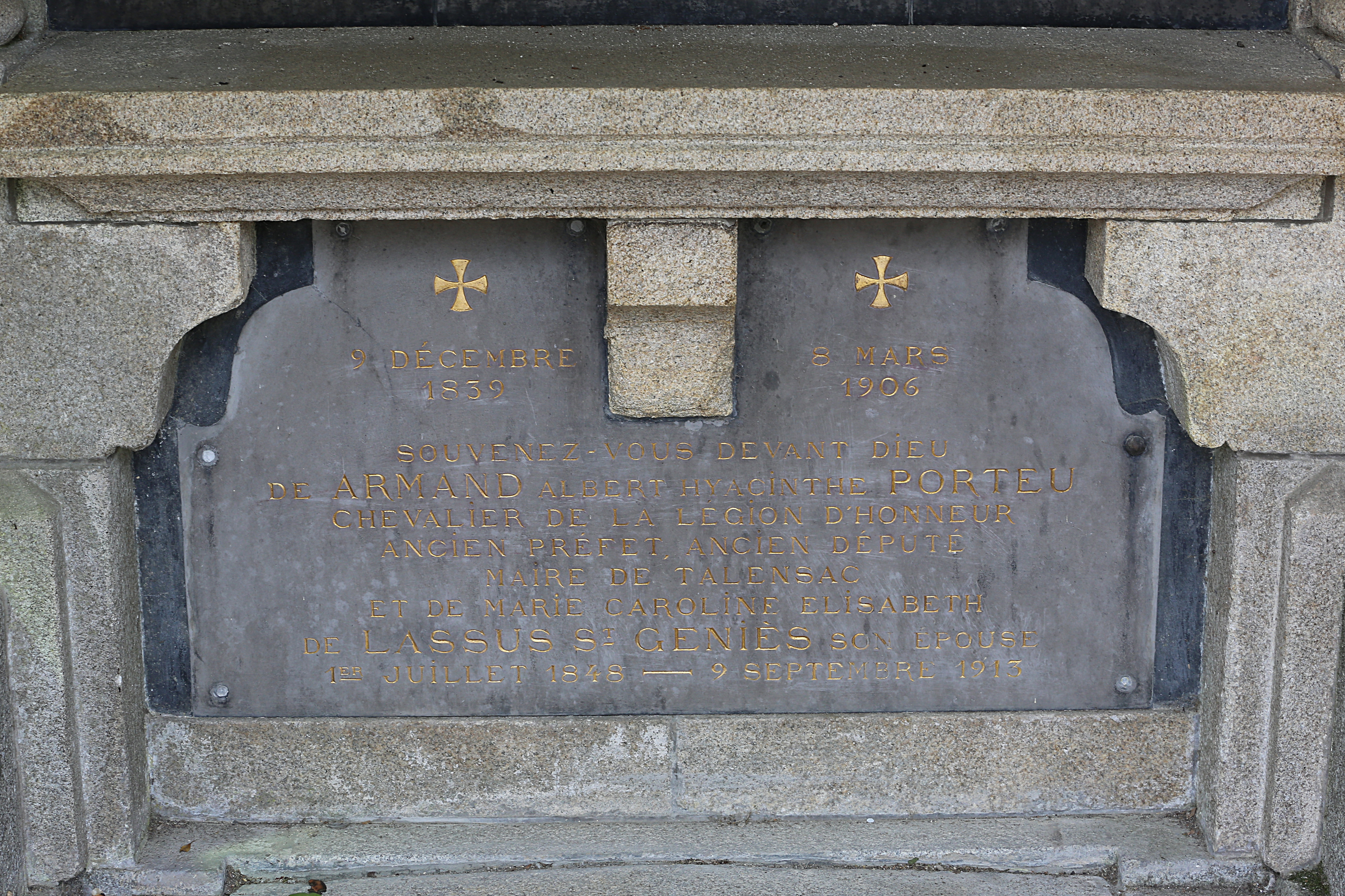 Sépulture de la famille Porteu de la Morandière à Talensac : Armand (1839-1906), ancien député, André (1870-1932), ancien député et ancien sénateur, et Paul, ancien sénateur. Tous trois se sont succédé à la mairie de la commune.